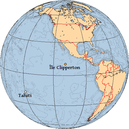 Situations de l'Île Clipperton (au centre) et de Tahiti (pour faciliter les comparaisons géographiques).